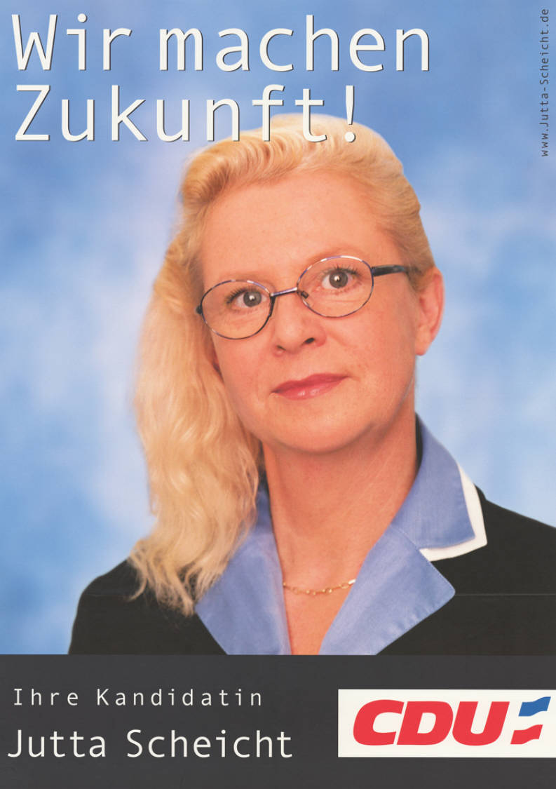 Wir machen Zukunft! Ihre Kandidatin Jutta Scheicht CDUAbbildung:PorträtfotoPlakatart:Kandidaten-/Personenplakat mit PorträtObjekt-Signatur:10-012 : 1235Bestand:Landtagswahlplakate Schleswig-Holstein (10-012)GliederungBestand10-18:Landtagswahlplakate Schleswig-Holstein (10-012) » CDULizenz:KAS/ACDP 10-012 : 1235 CC-BY-SA 3.0 DE